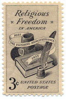 U.S Postage Stamp, 1957